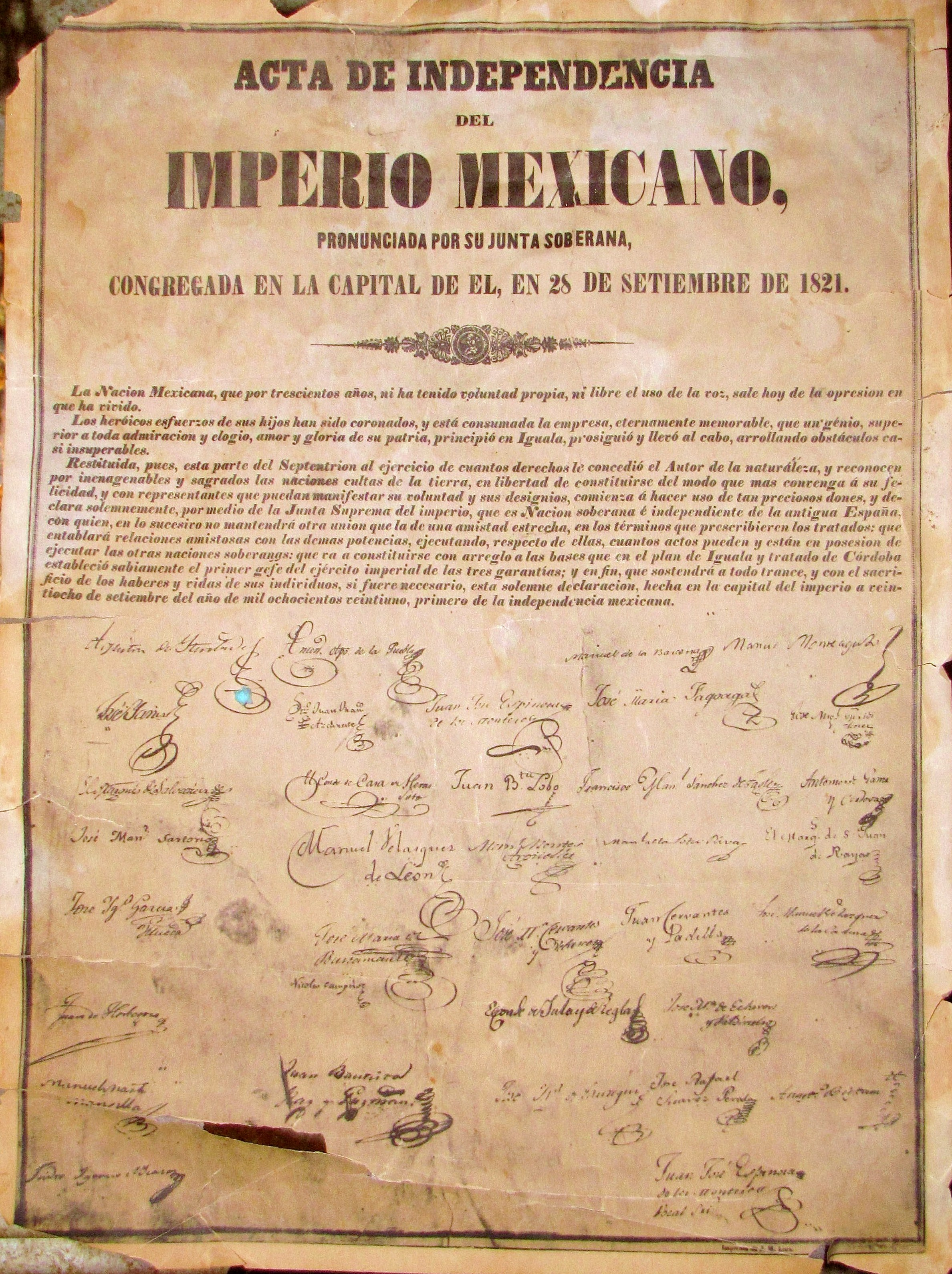 Fotografía de una publicación facsímil del Acta de Independencia del Imperio Mexicano